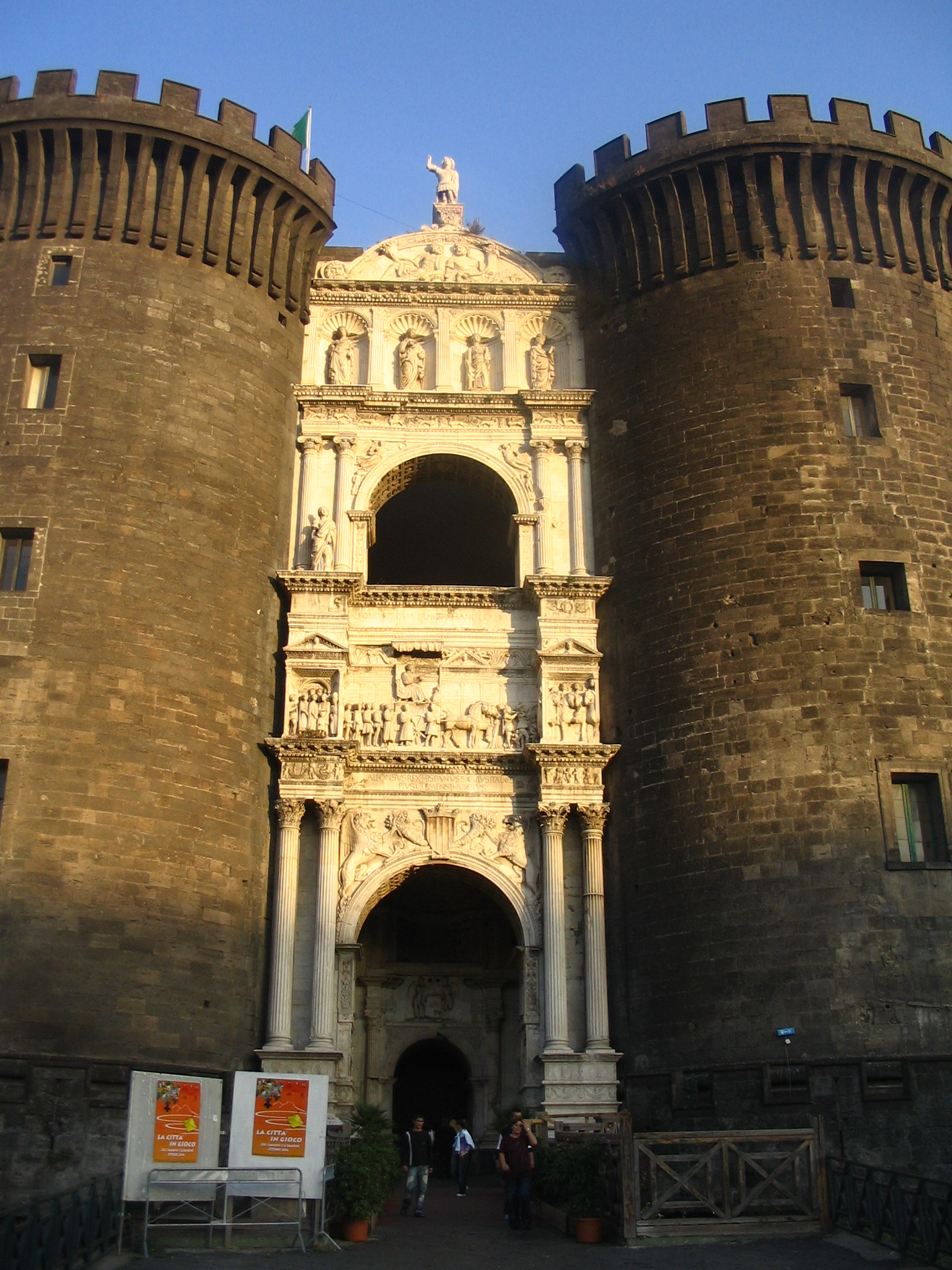 Maschio Angioino (Castel Nuovo), Arco trionfale